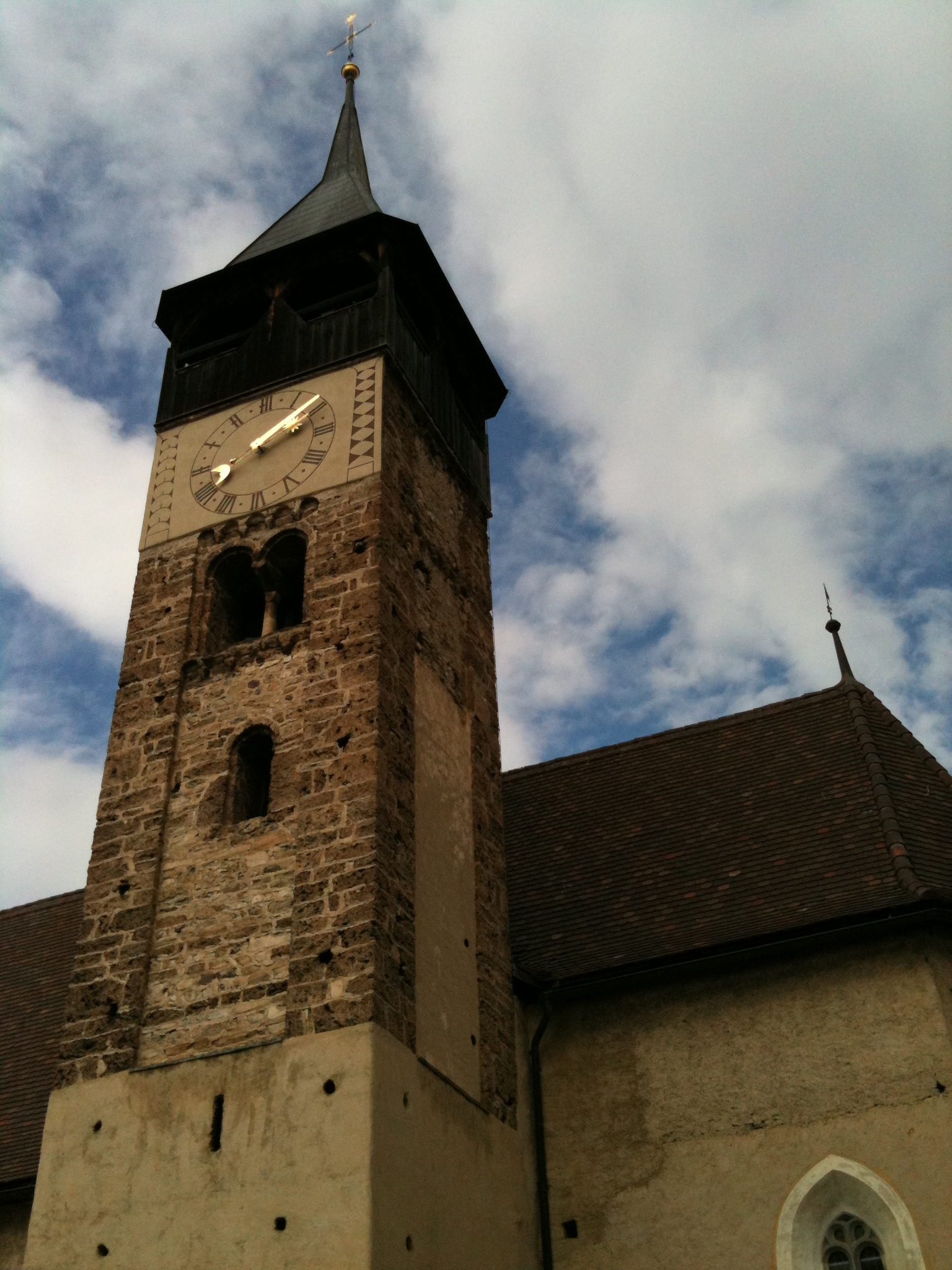 Kirchturm in Scharans, Kanton Graubünden